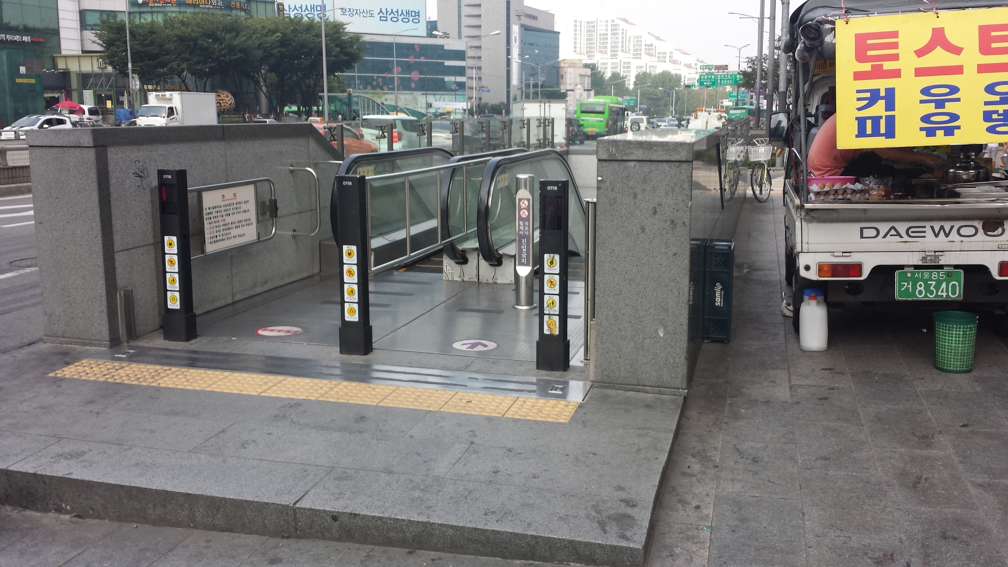 5/8호선 천호역